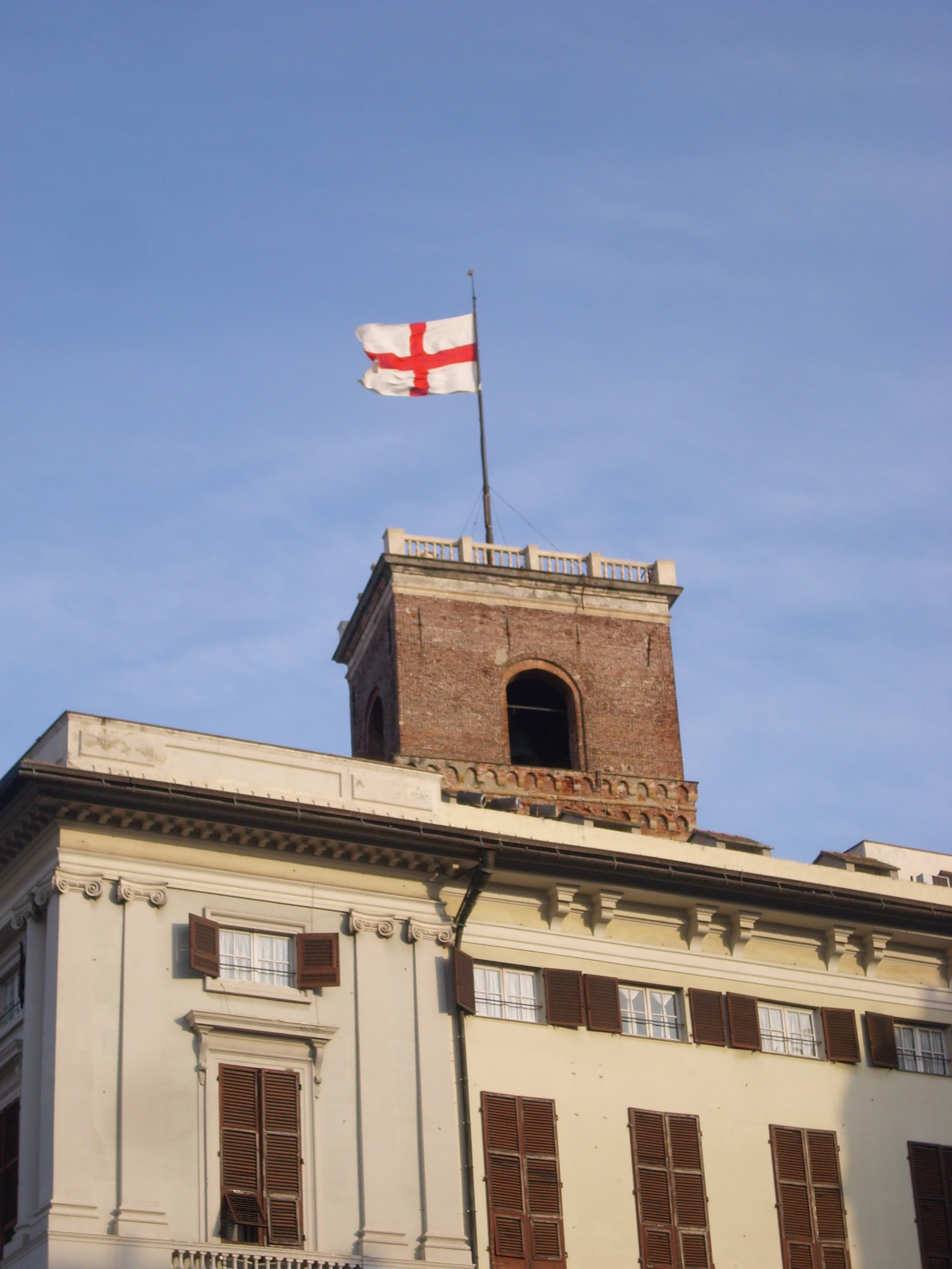 La Torre Grimaldina posta di fianco a Palazzo Ducale a Genova.